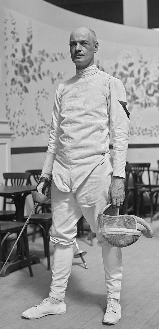 Albaret, Suisse [escrimeur, Luna Park, championnat d'Europe d'escrime, 16-17 juin 1922] : [photographie de presse] / [Agence Rol]